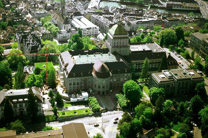 Kollegienhaus Tower Universität Zürich